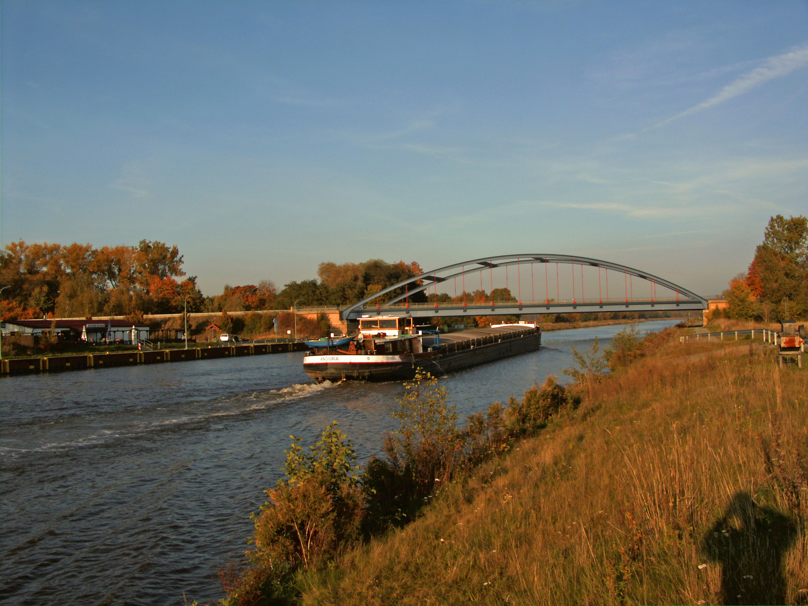 Der Mittellandkanal zwischen Rühen und Grafhorst